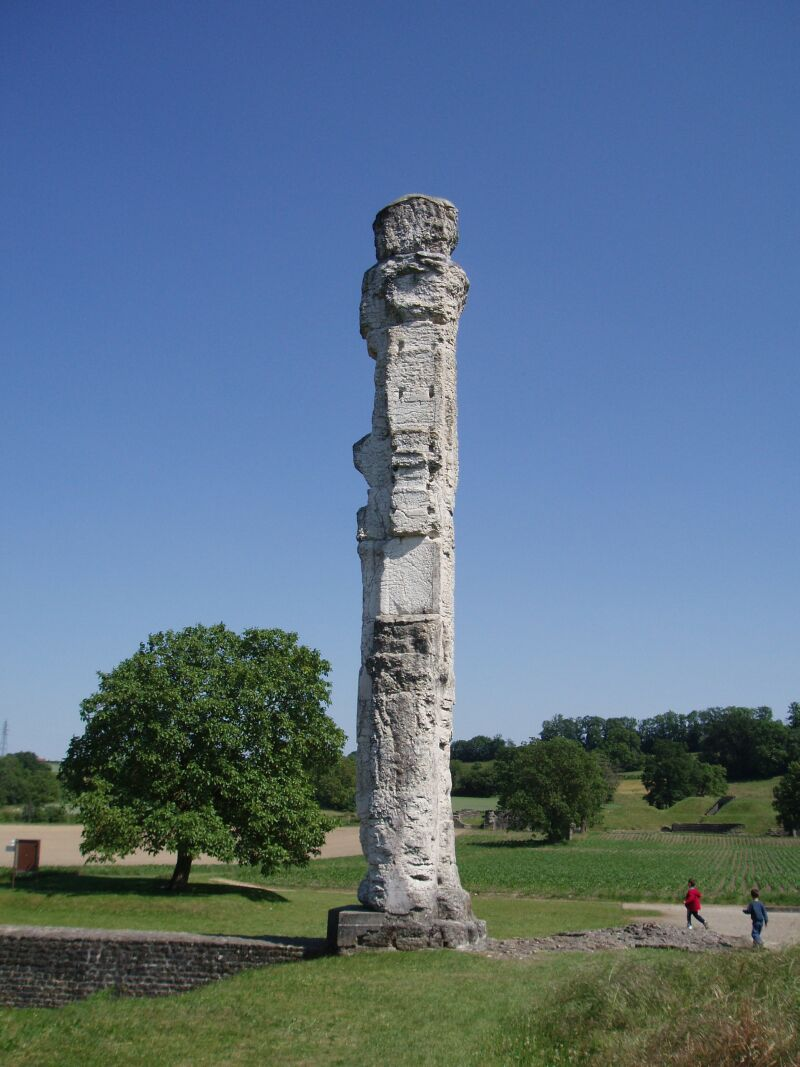 Überrest der ehemaligen Tempelanlage Cigognier in Aventicum (Avenches)